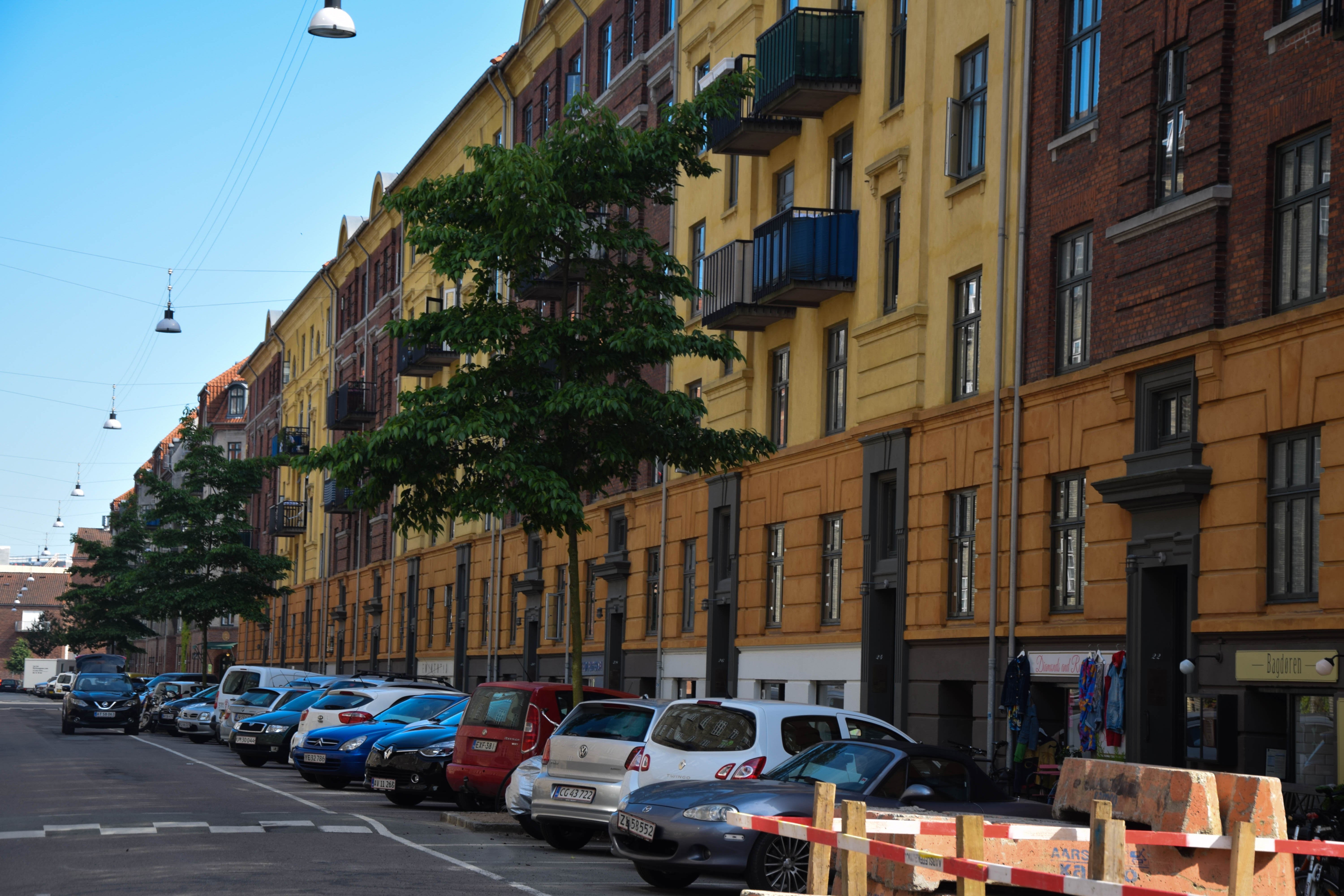 Njalsgade in Copenhagen, Denmark